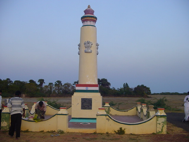 வேதாரண்ய உப்புசத்தியாகிரகத்தை நினைவு கூறும் வண்ணம் அமைக்கப்பட்டிருக்கும் ஸ்தூபி. மூதறிஞர் ராஜாஜியால் திறந்து வைக்கப்பெற்றது இது.